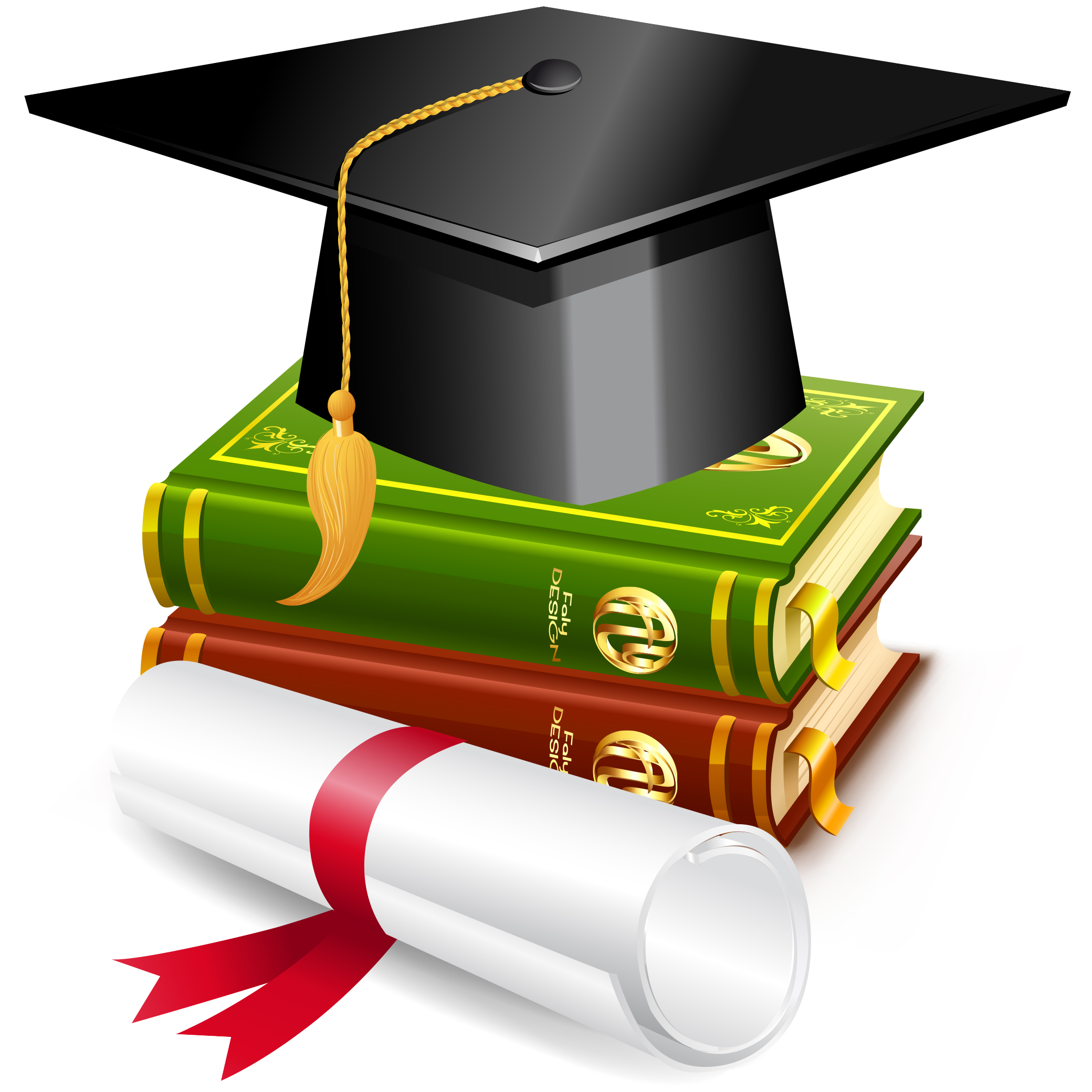 Symbole